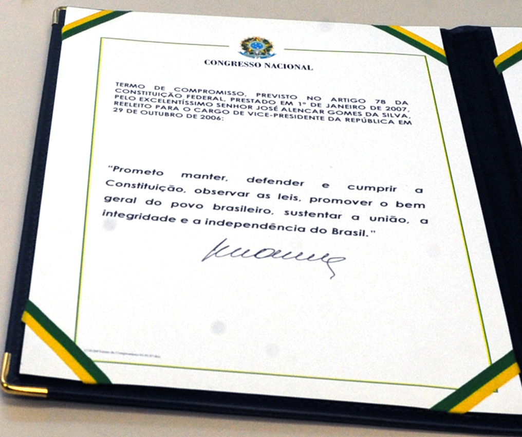 Livro de posse saiu do arquivo de documentos históricos do Senado.Assinauta Vice-Presidencial de José Alencar Gomes da Silva.